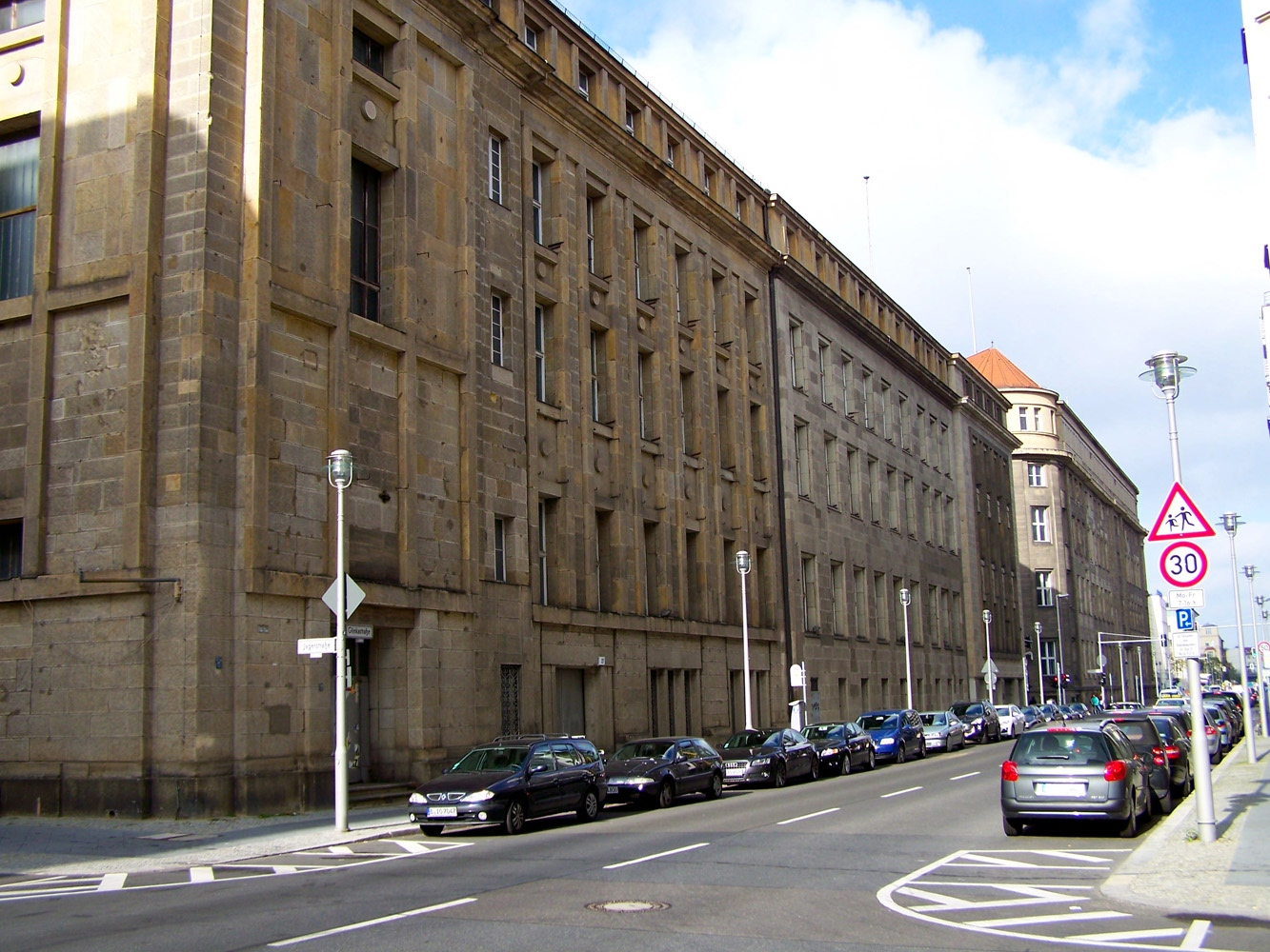 Der Gebäudekomplex der Deutschen Bank in Berlin-Mitte. Block II - Ostfassade. Block I im Hintergrund.